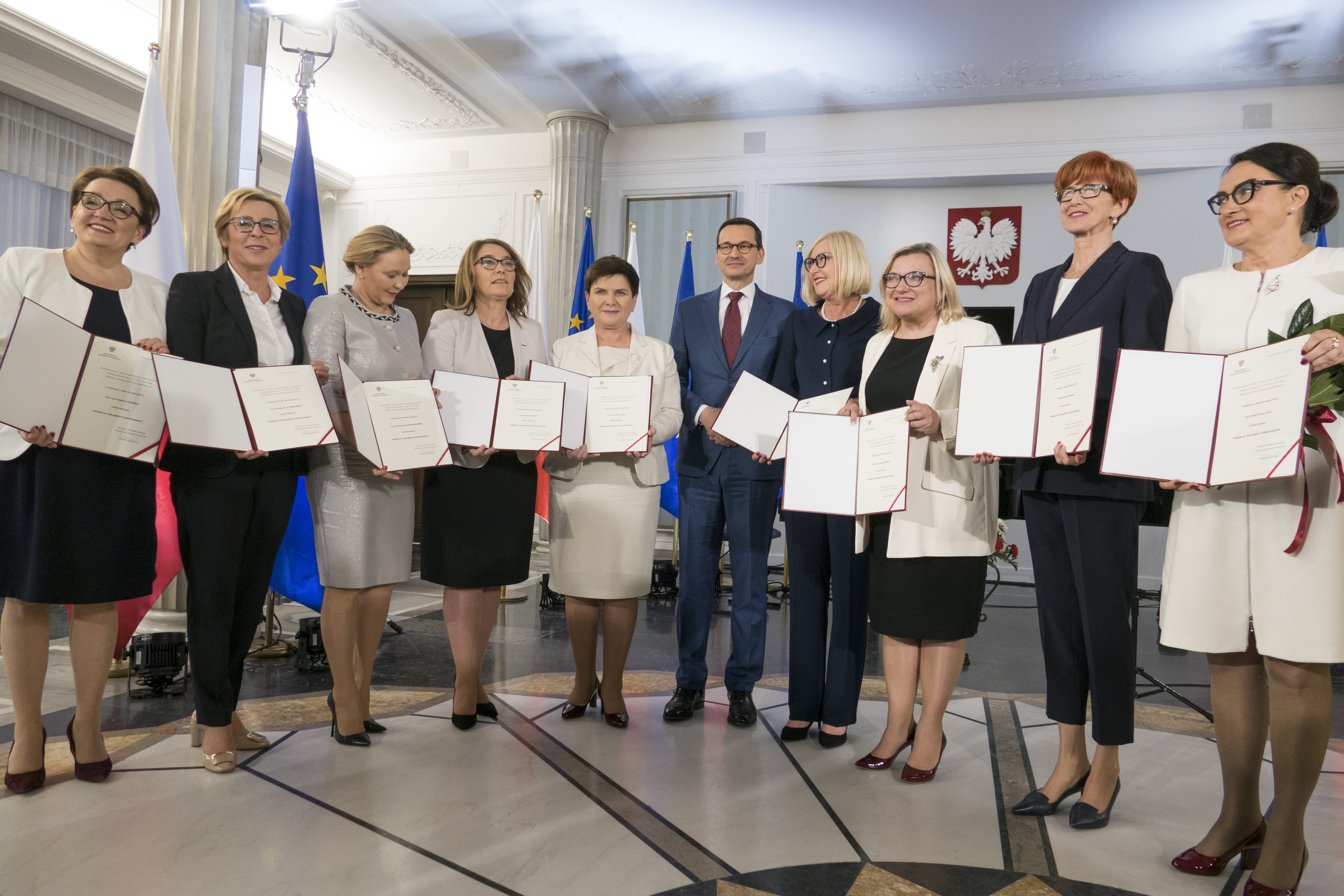 Część polskich eurodeputowanych podczas uroczystości wręczenia aktów stwierdzenia wyboru do Parlamentu Europejskiego w Sali Kolumnowej Sejmu.